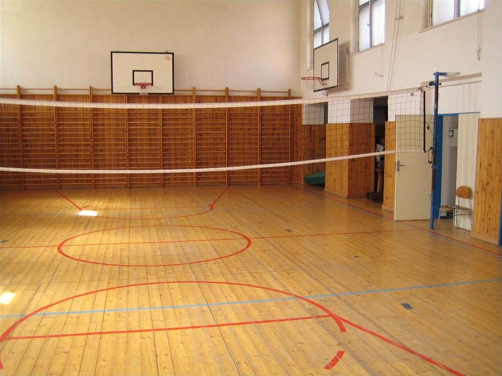 Vybavení školy